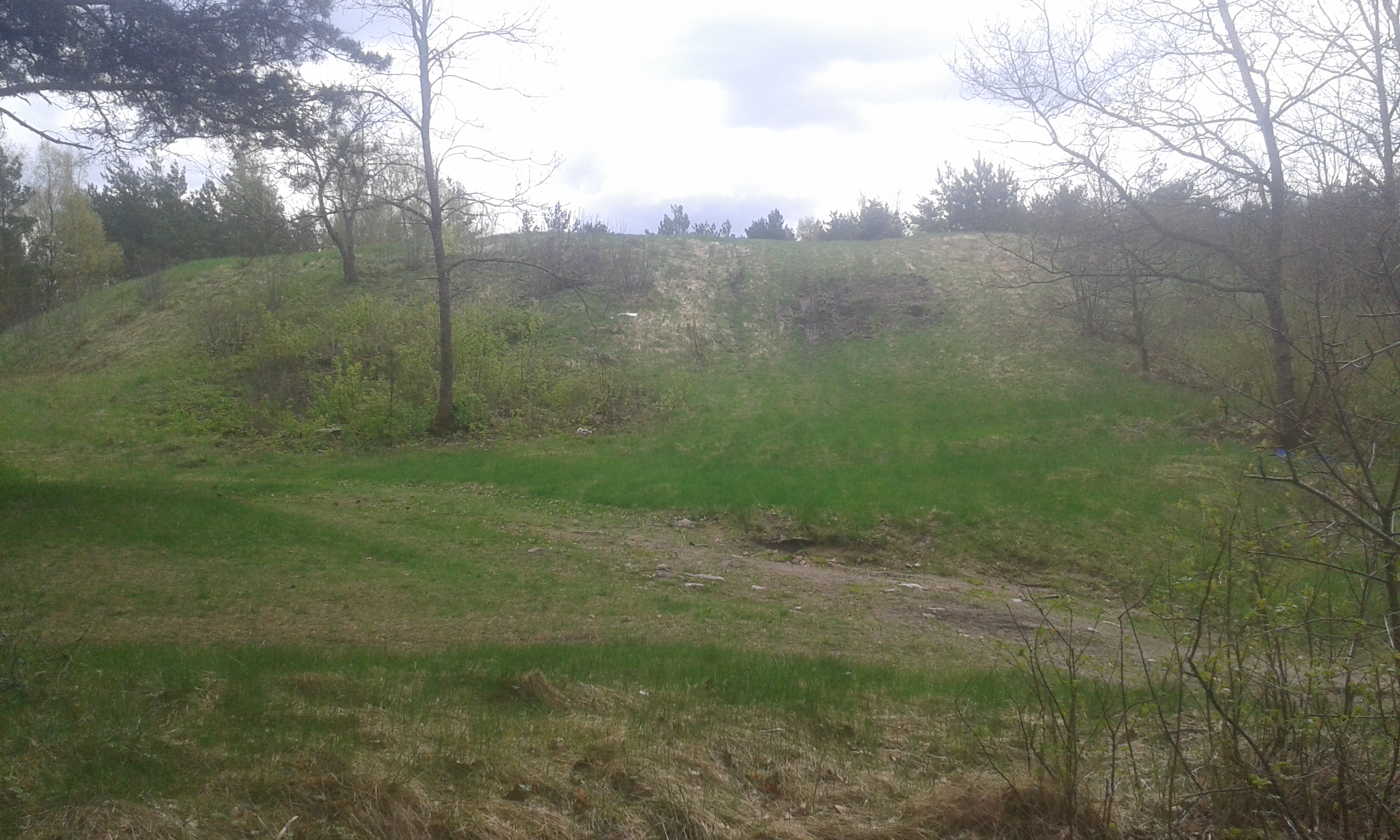 Vaade linnamäele põhja suunas